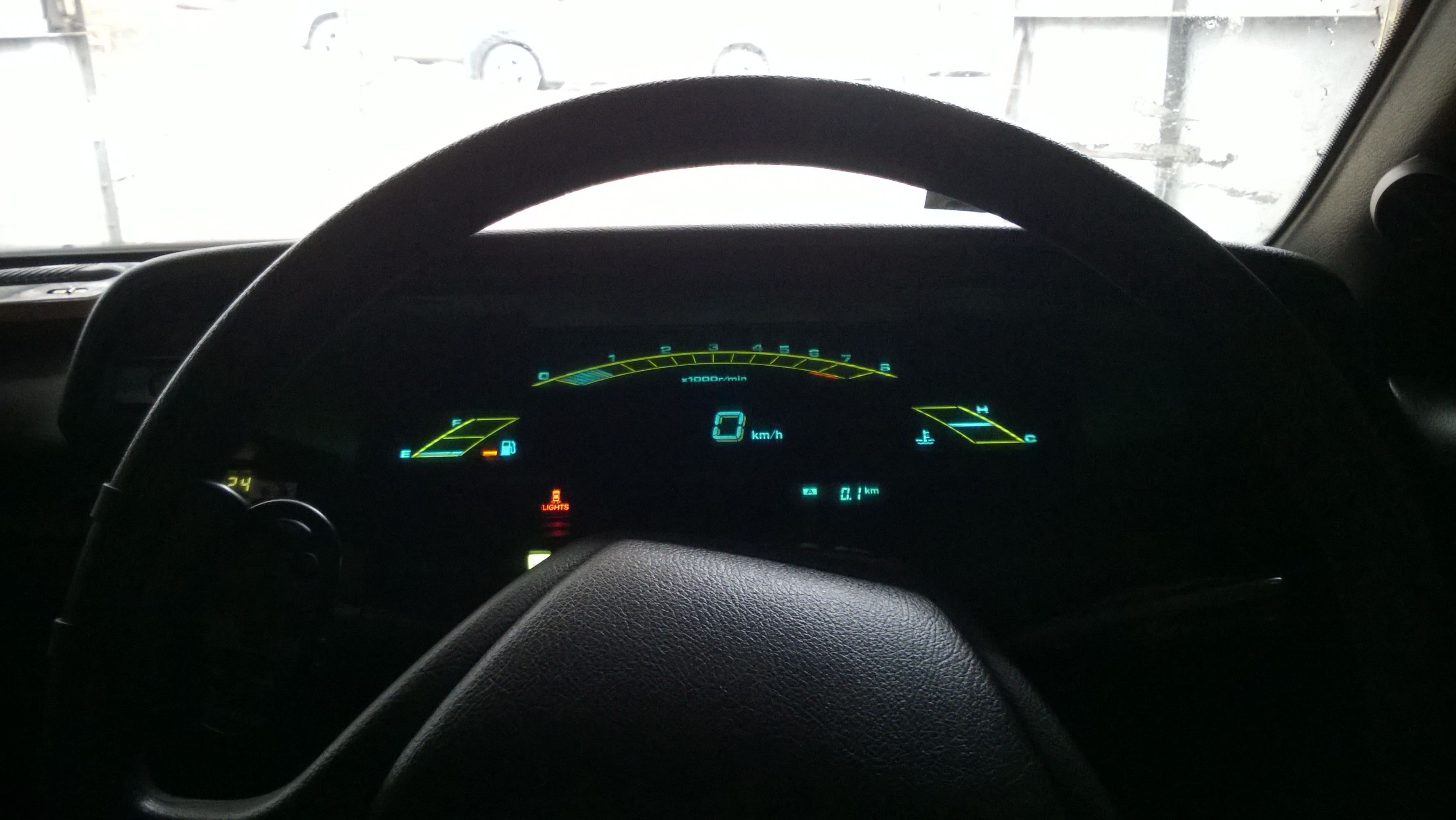 TOYOTA Vista SV21 Приборка